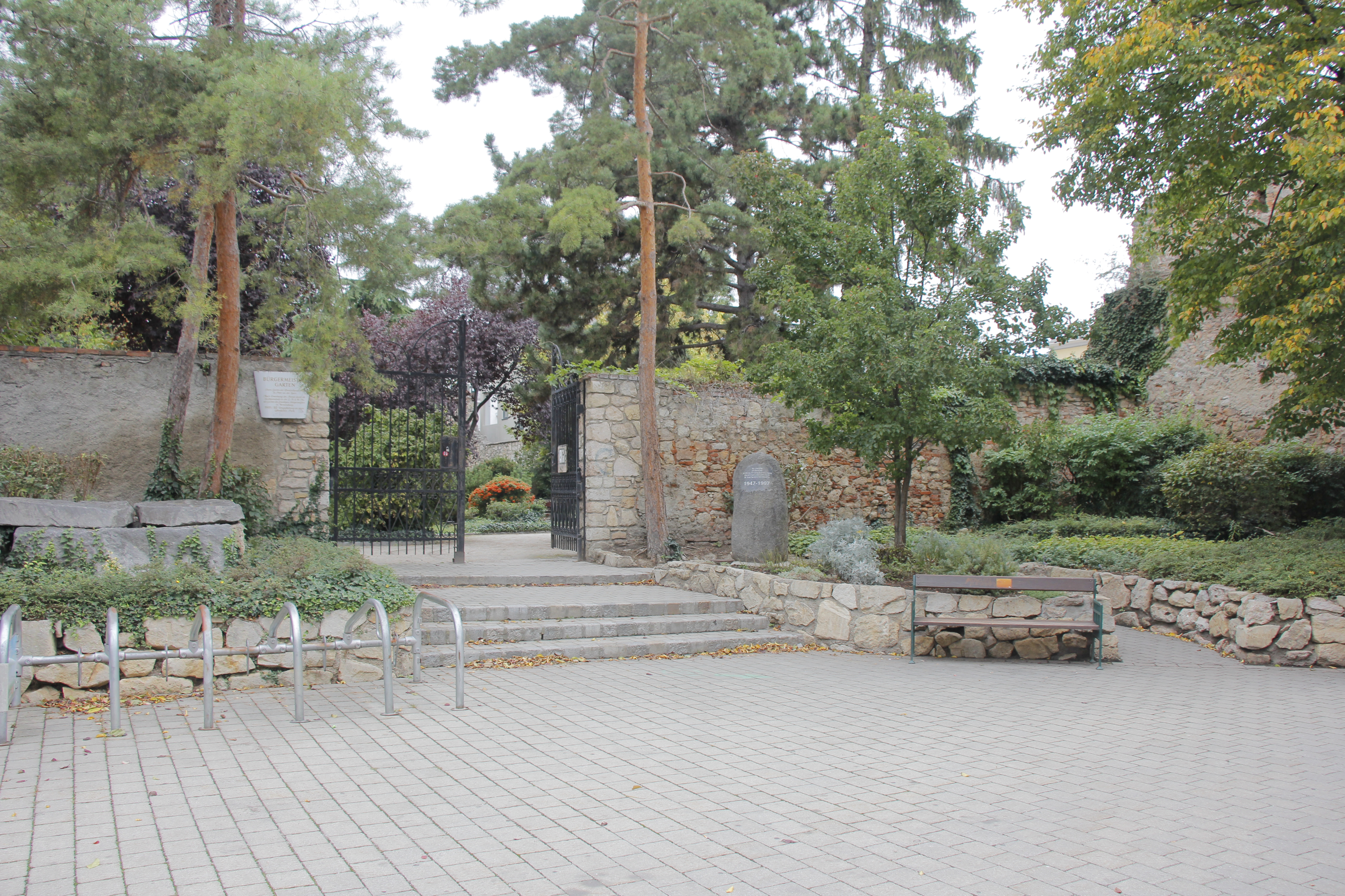 Eingang zum Bürgermeistergarten in Wiener Neustadt, gegenüber dem Stadtmuseum